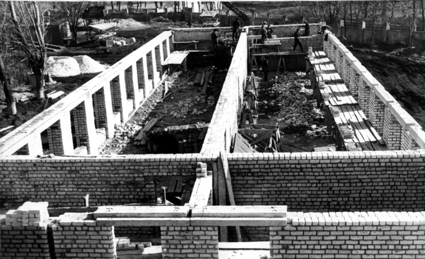 Строительство нового здания конструкторского отдела 31 Завода авиационного технологического оборудования (Новочеркасск)